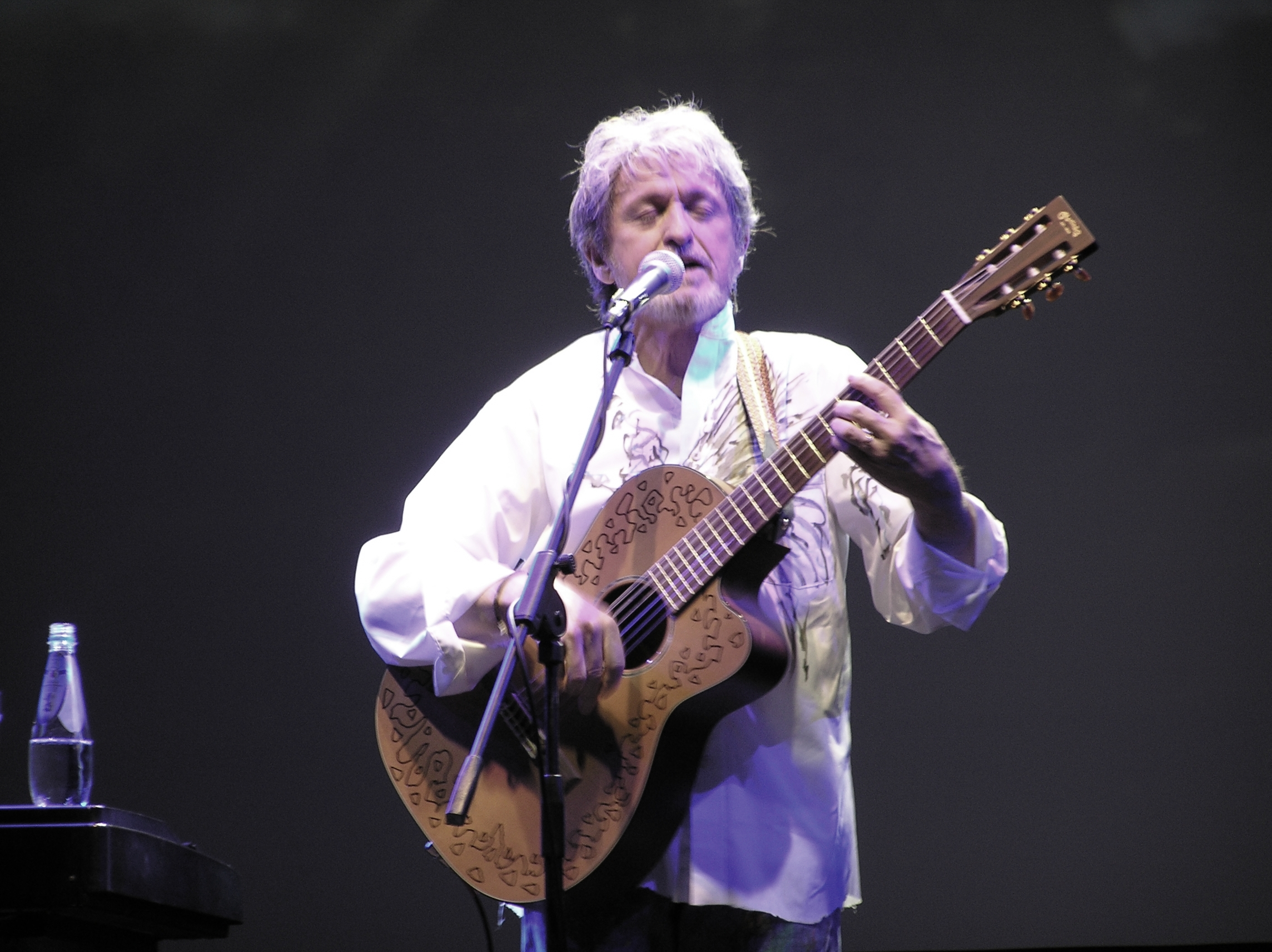 Jon Anderson in concerto al Maxlive di Costabissara, Vicenza, Italia, 29 novembre 2007.